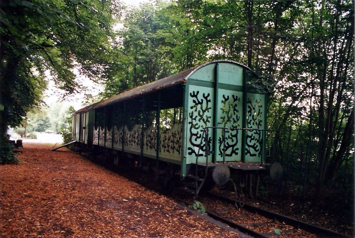 Ausgemusterte Wagons auf stillgelegten Gleisen am Ratzeburger Bahnhof